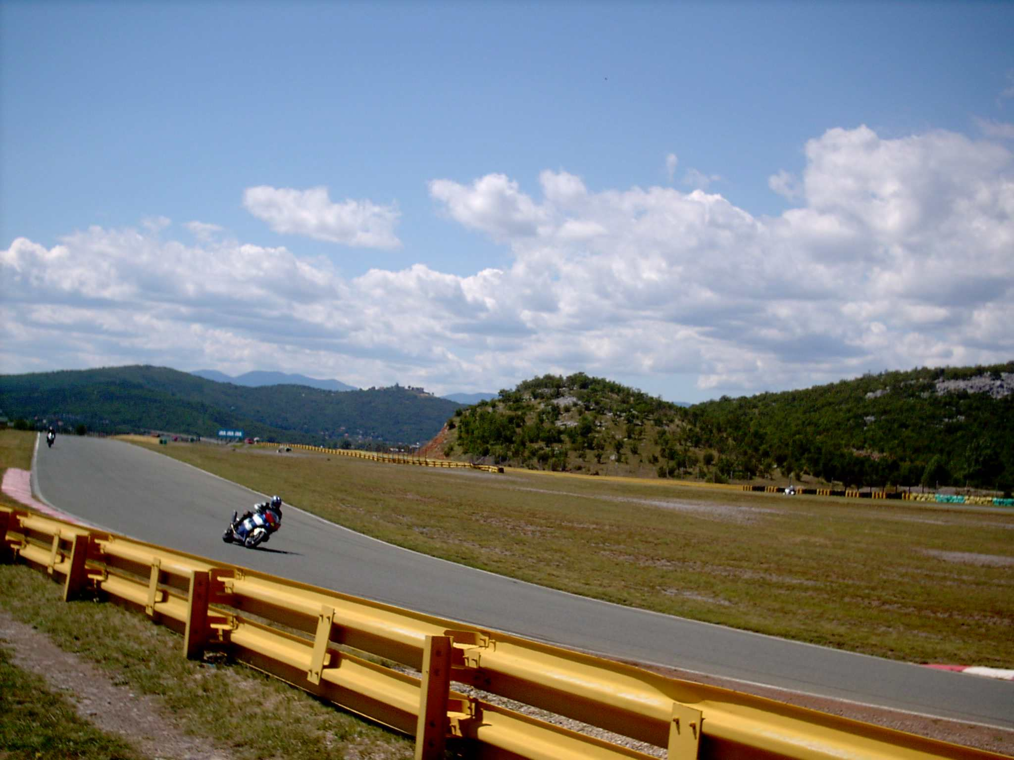 bild selbst erstellt